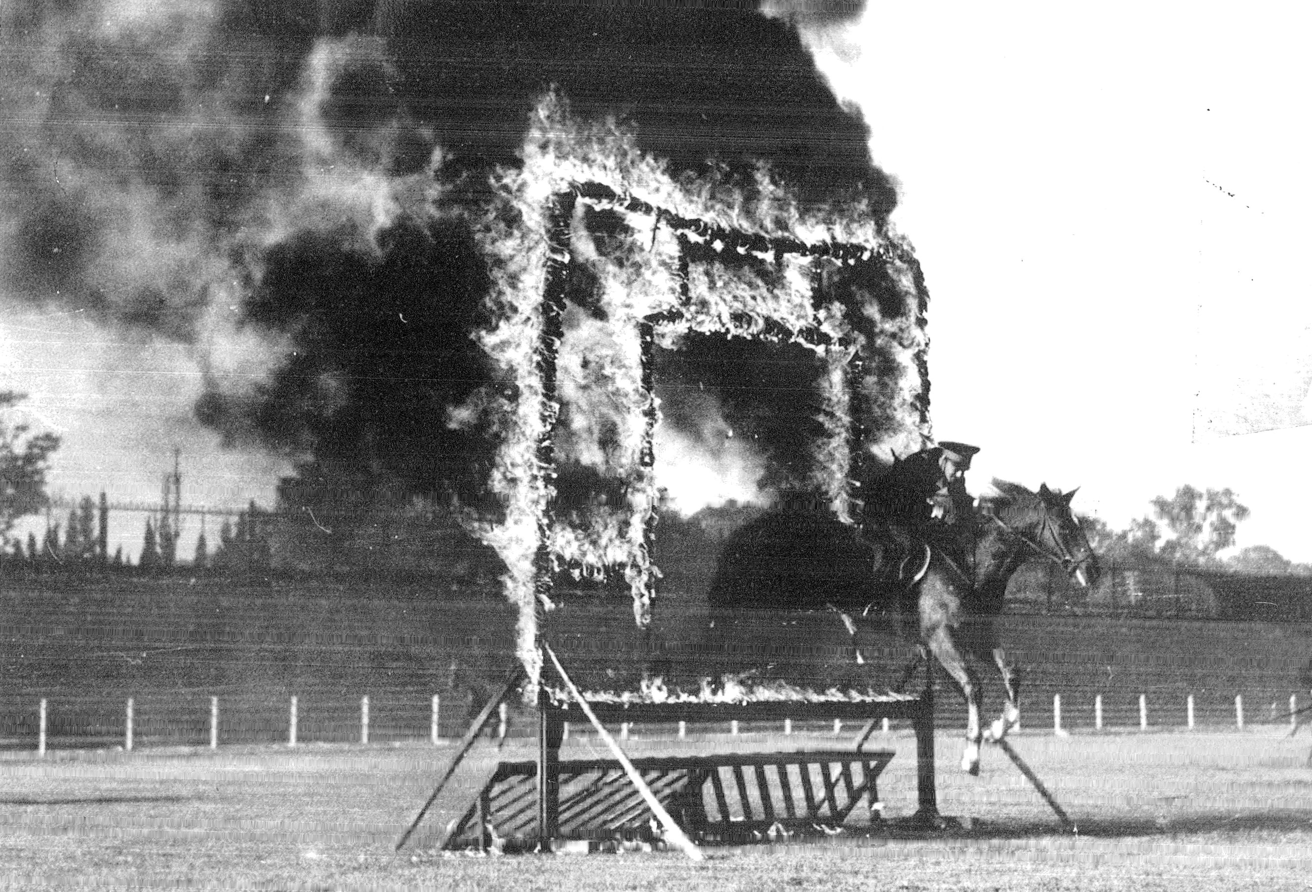 Oficial de la Policía Montada, saltando a través de un arco de fuego. Siglo XX. Inventario 616.